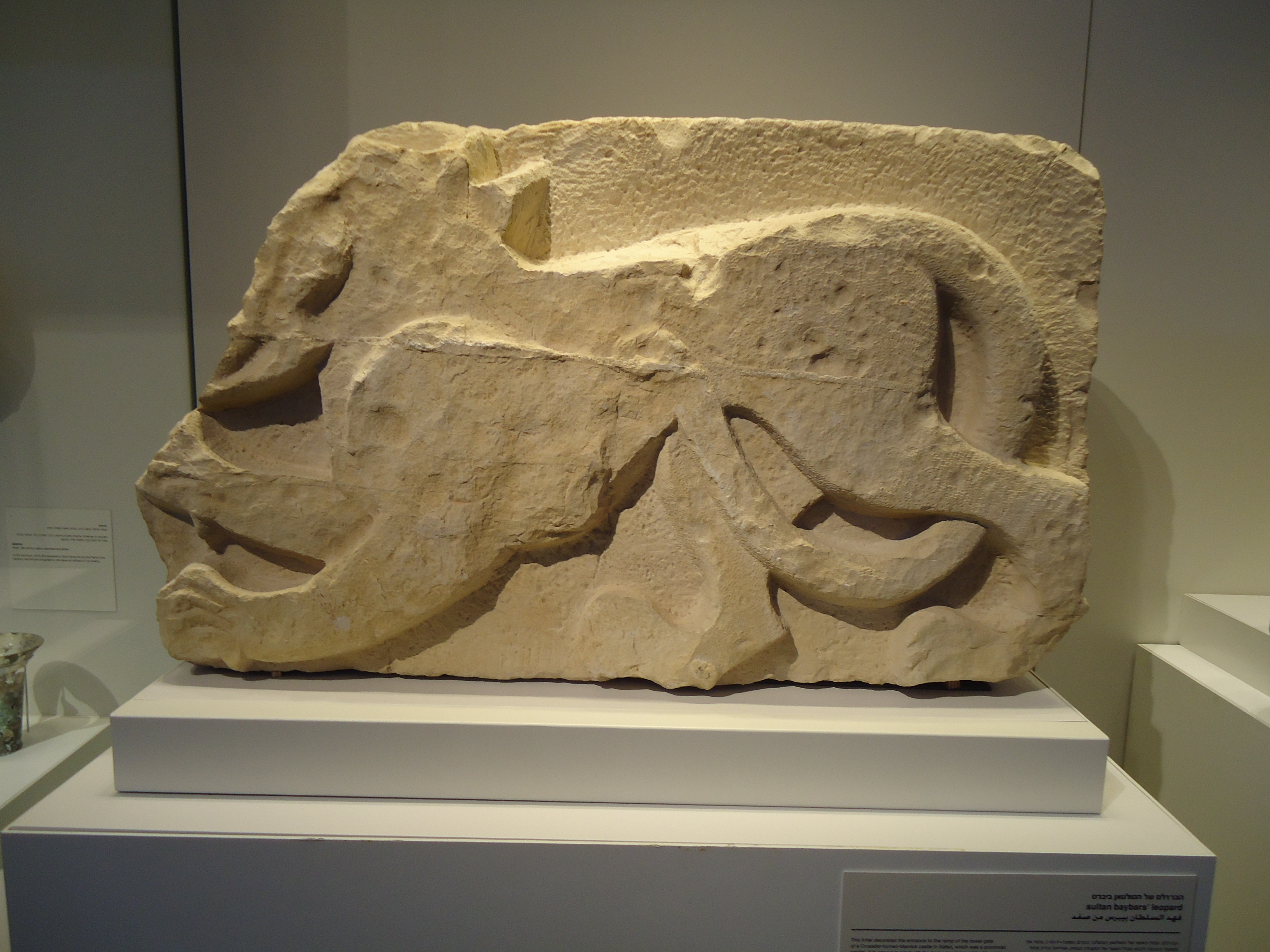 סמלו של הסולטאן ביברס, אשר נמצא במצודת צפת. נמצא כיום במוזיאון ישראל